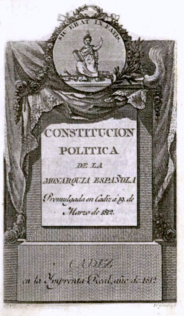 Portada de la Constitución de 1812, firmada al pie "F. de Pilar lo dº / P. Gascó lo G", Cádiz, Imprenta Real, 1812